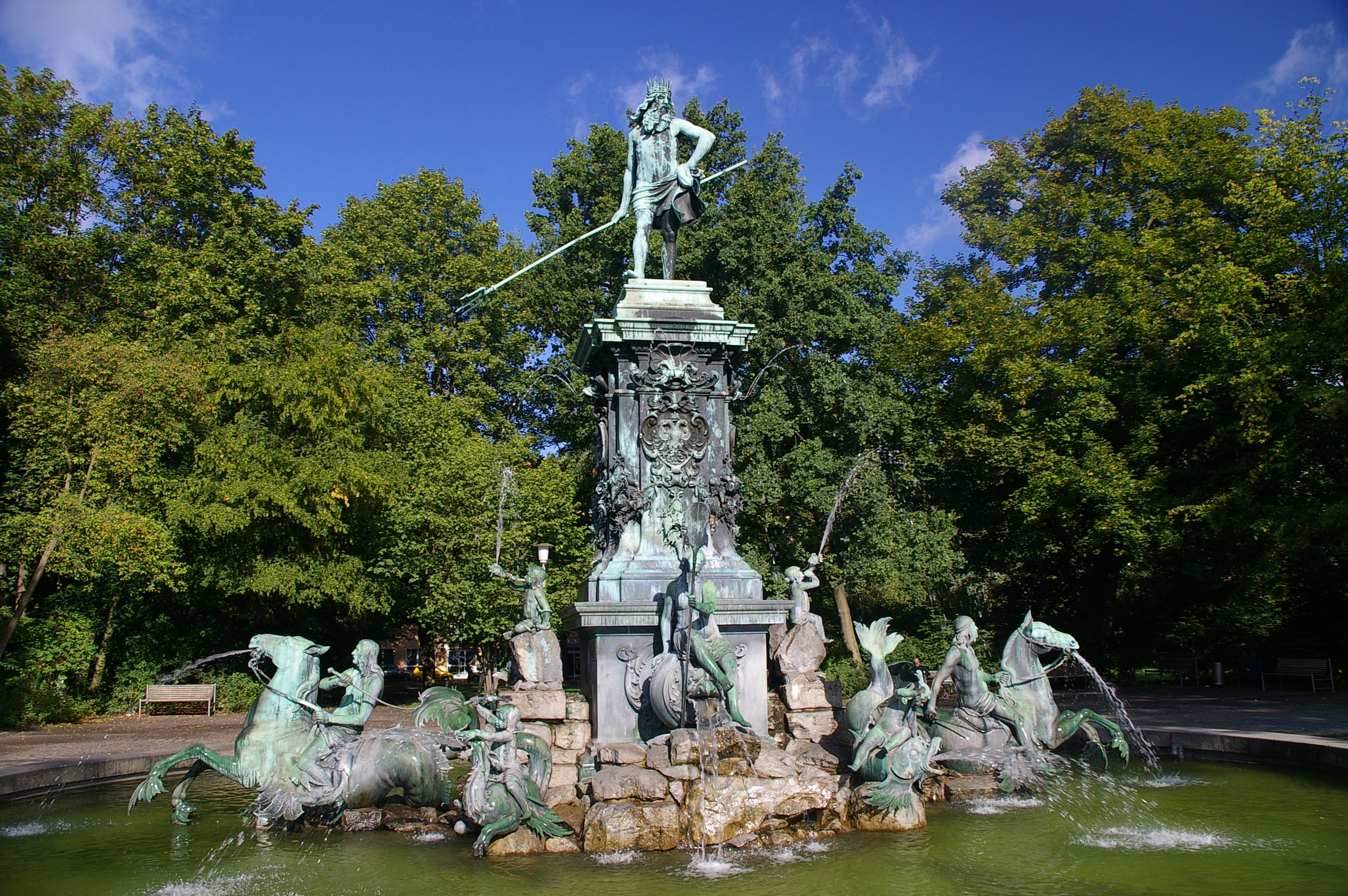 Der Neptunbrunnen im Nürnberger Stadtpark (eine Kopie nach Georg Schweigger).